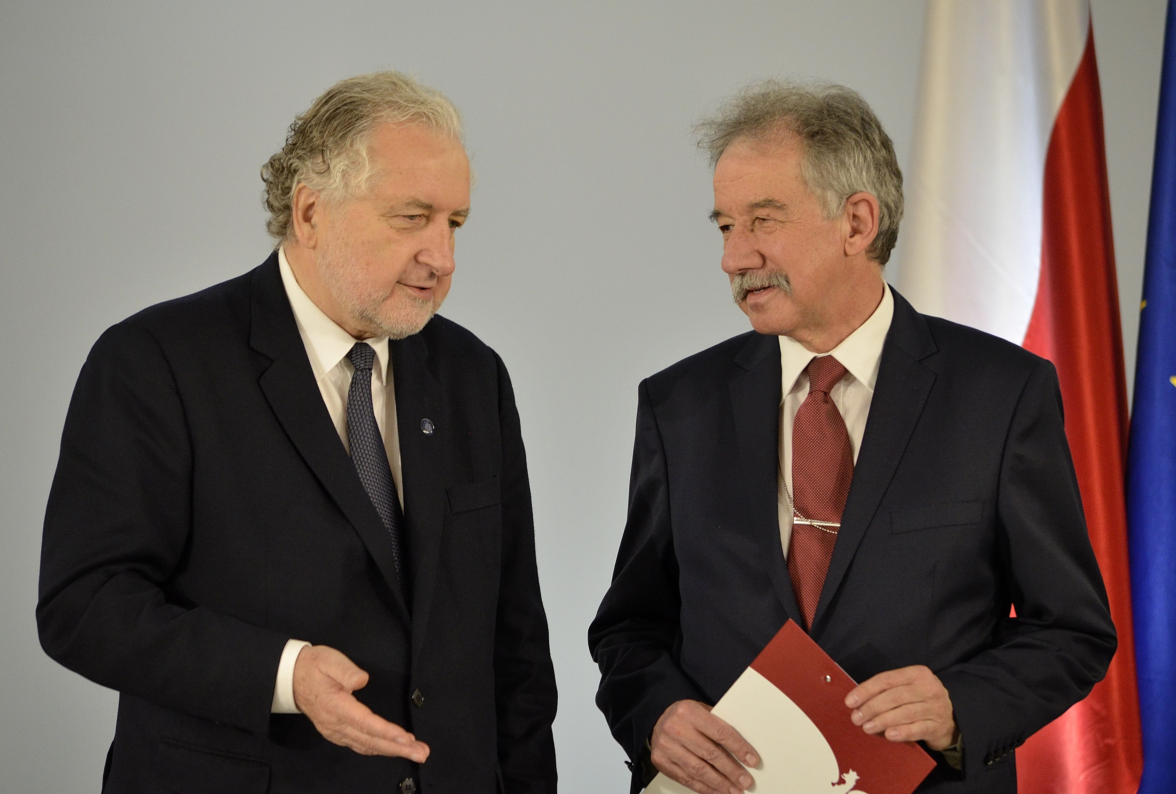 Prezes Trybunału Konstytucyjnego Andrzej Rzepliński i przewodniczący Państwowej Komisji Wyborczej Wojciech Hermeliński podczas uroczystości wręczenia zaświadczeń o wyborze nowo wybranym posłom w Sali Kolumnowej Sejmu